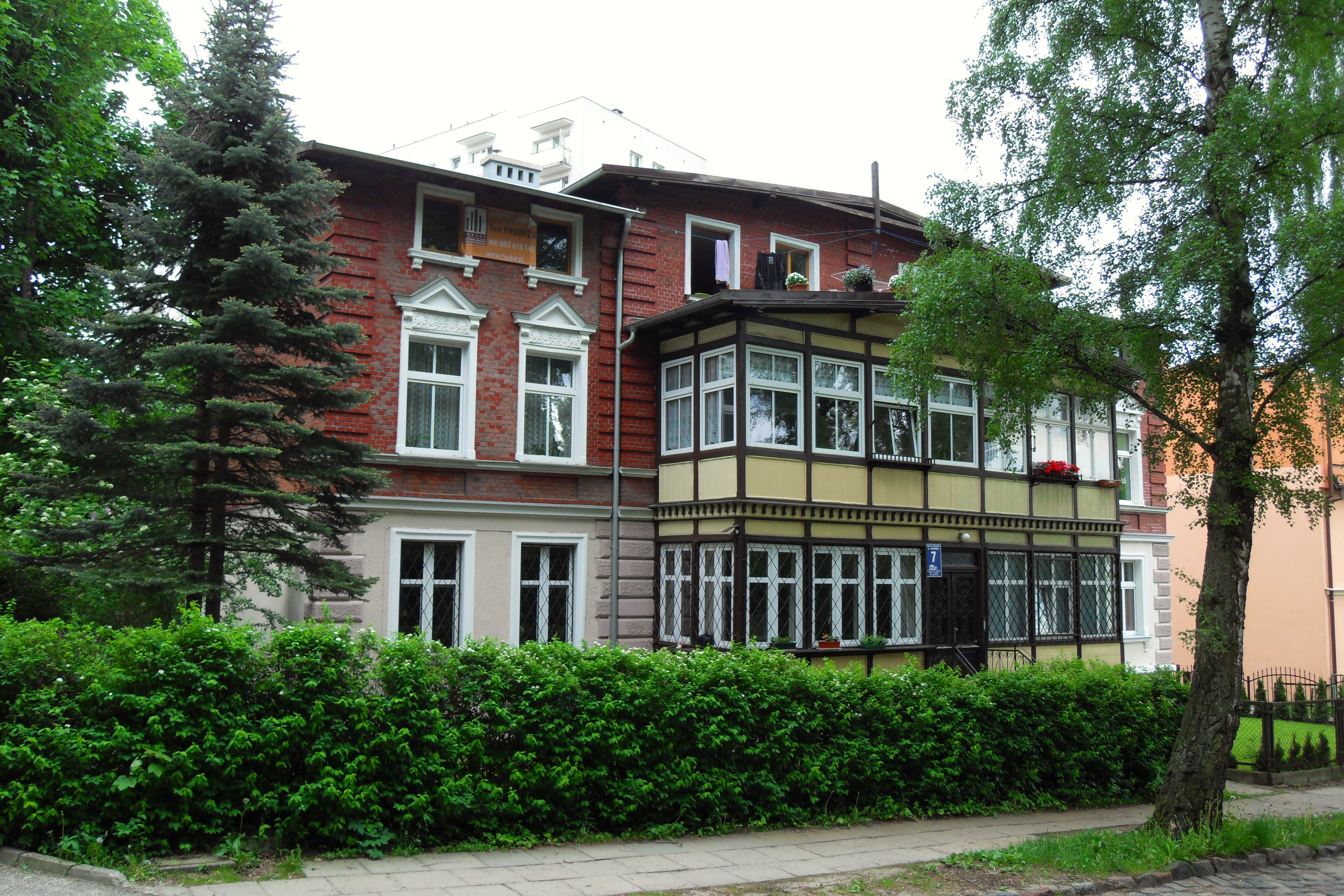 Gdańsk Oliwa, ul. Tatrzańska 7.